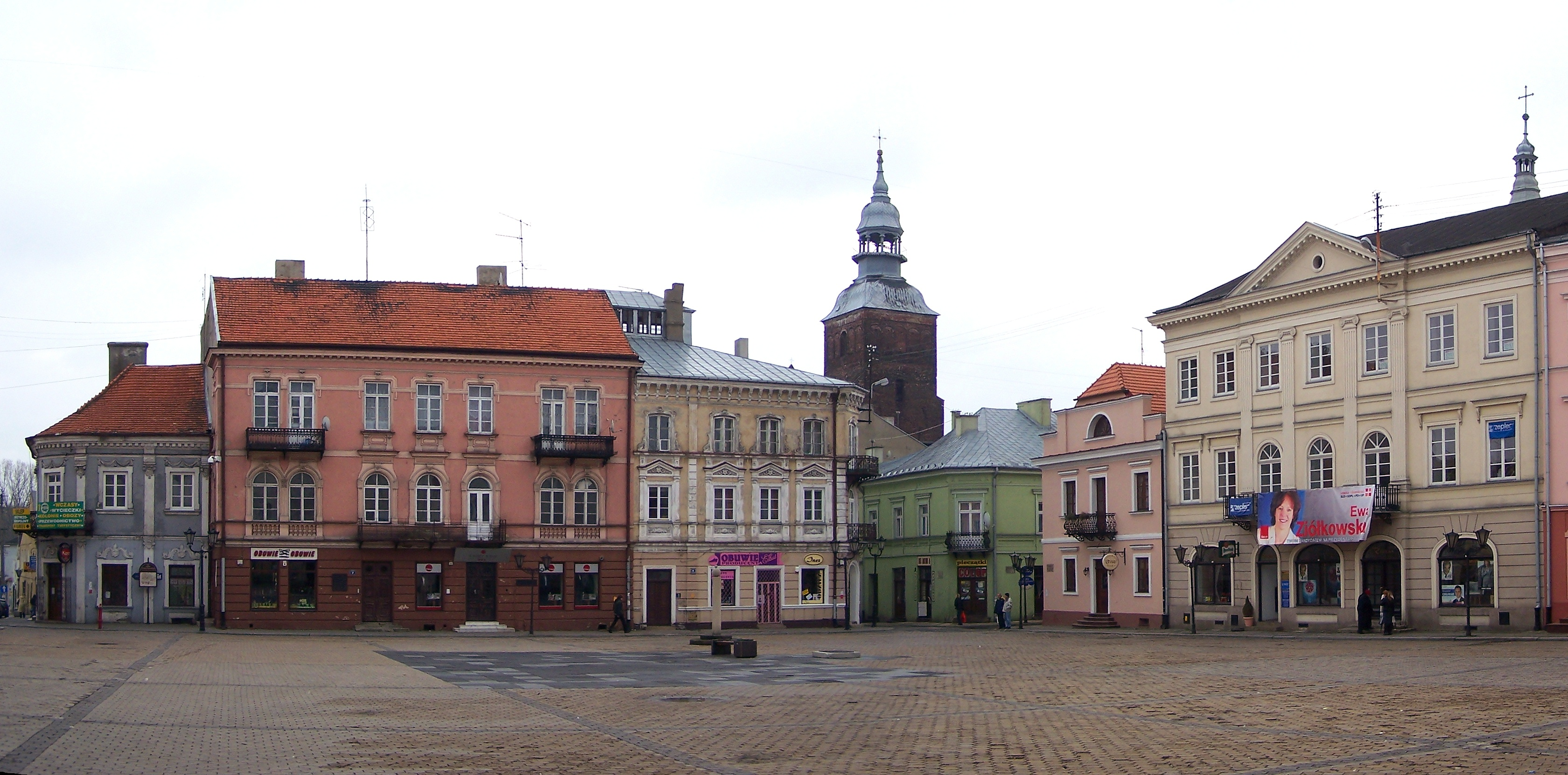 Rynek w Piotrkowie Trybunalskim.